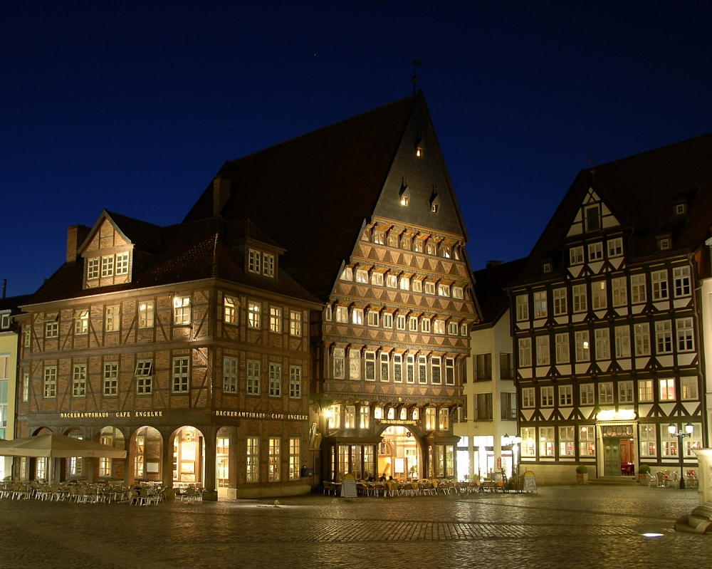 Knochenhaueramtshaus_&_Baecheramtshaus_a_Hildesheim.JPG